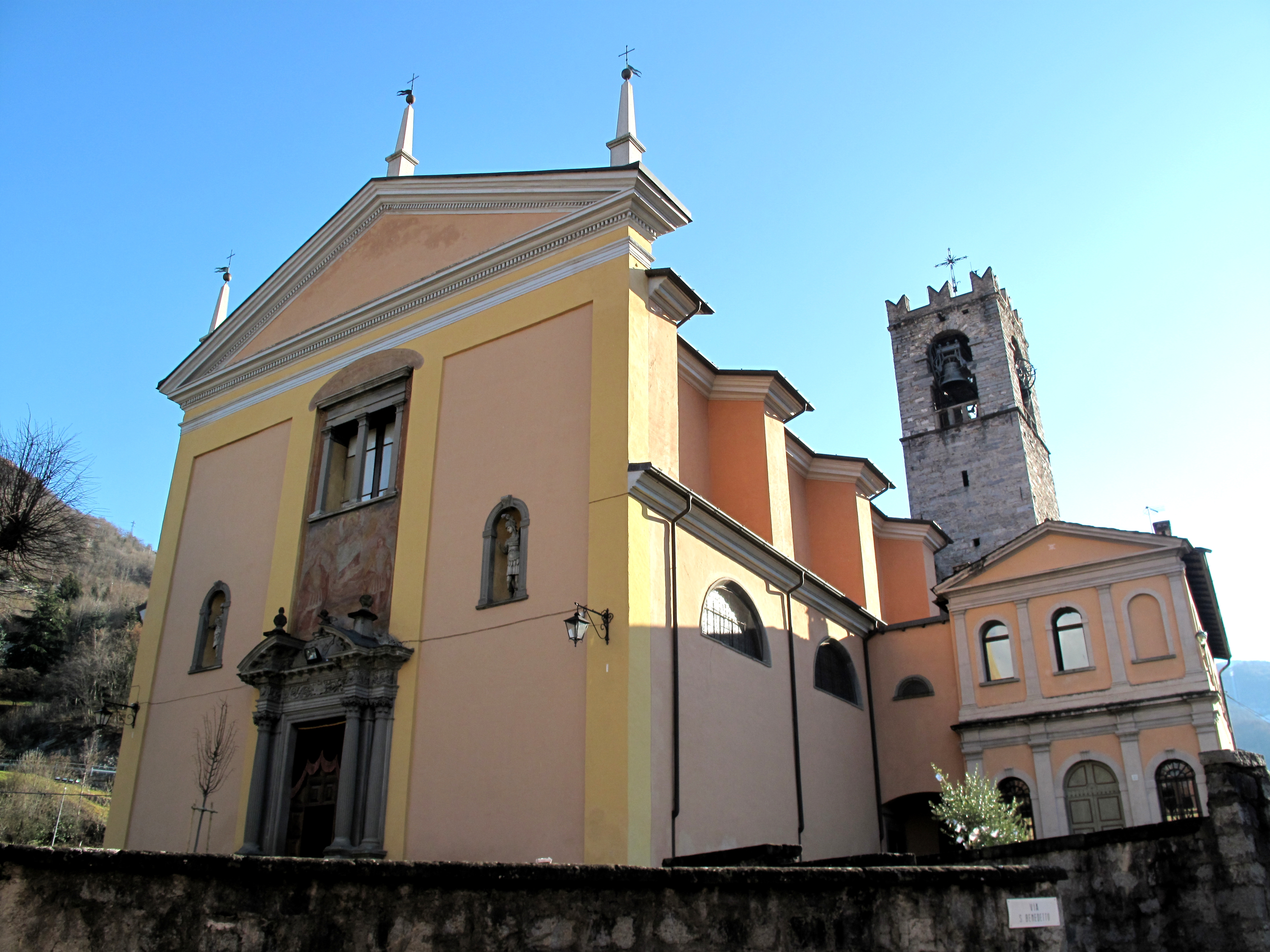 Chiesa di San Faustino e Giovita a Bienno (BS)